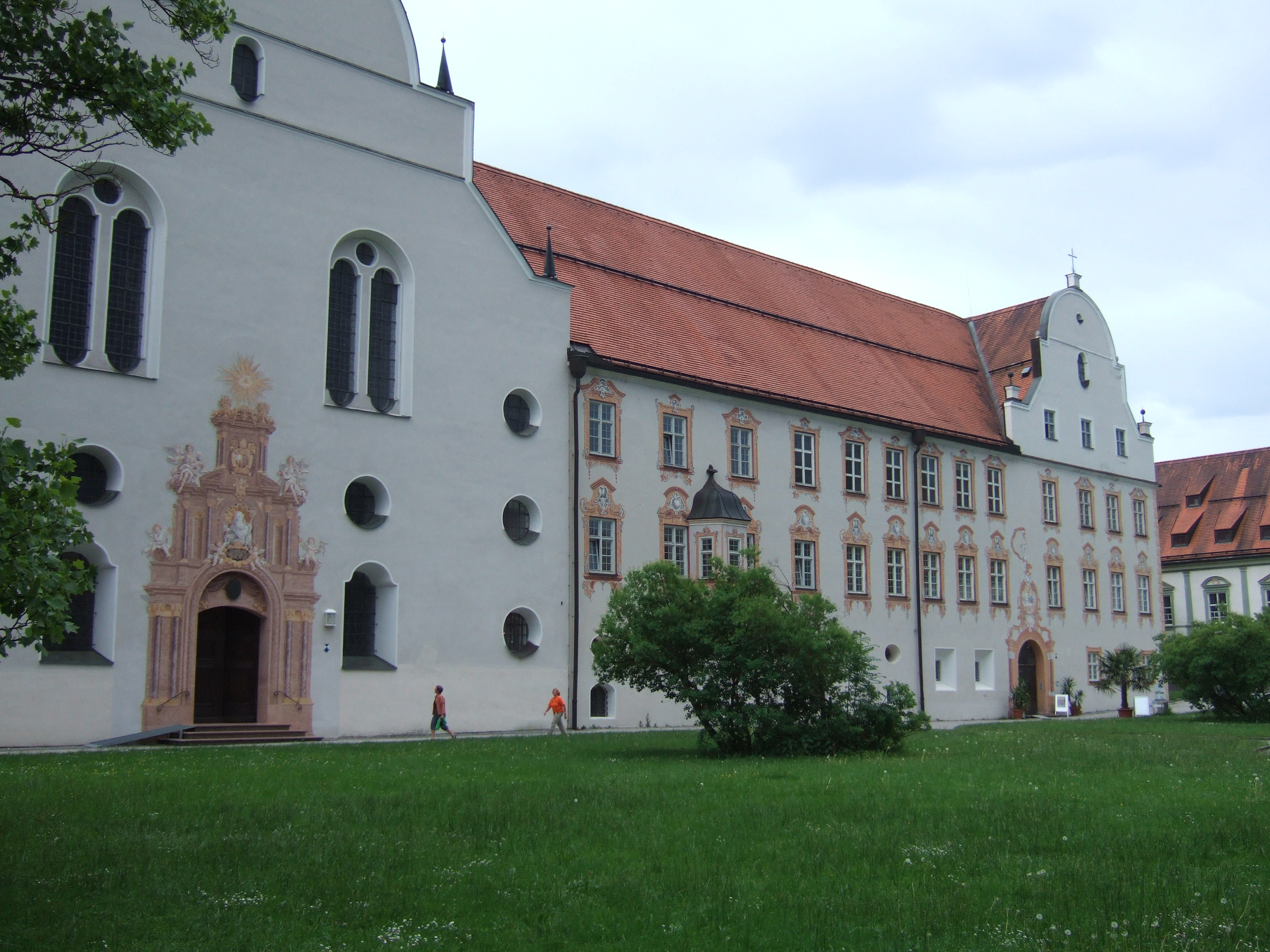 Kloster Benediktbeuern, Innenhof. Eingang zur Klosterkirche links im Bild, rechts das Konventsgebäude